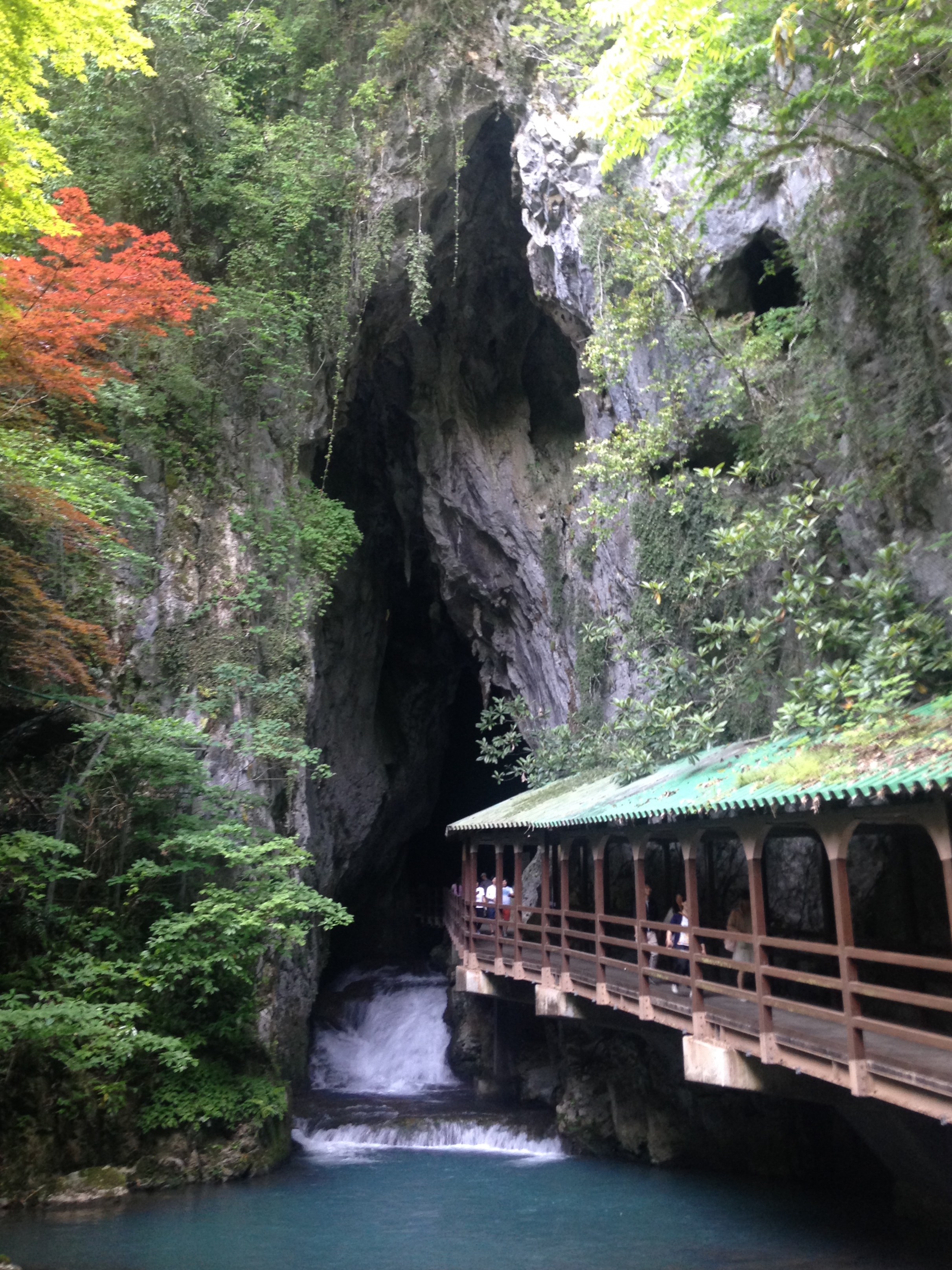 滝穴橋より望む秋芳洞の入り口